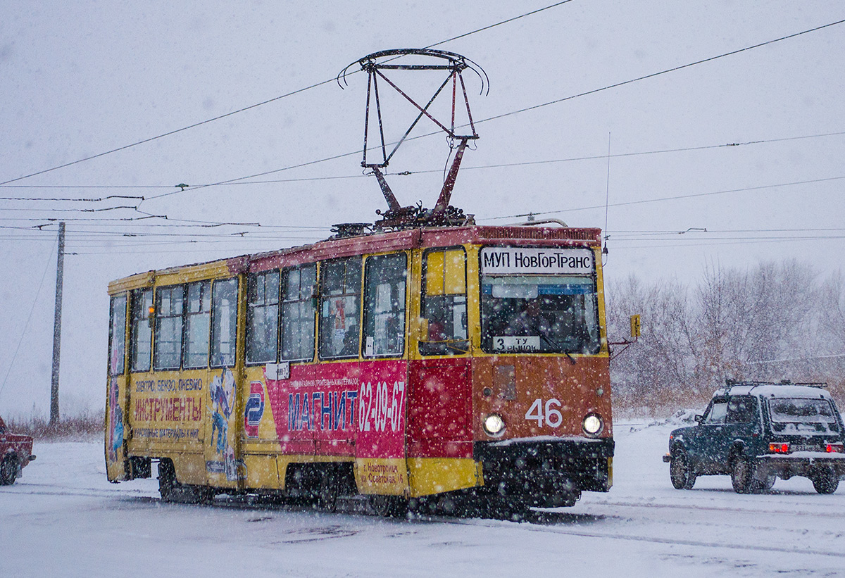 Новотроицкий трамвай